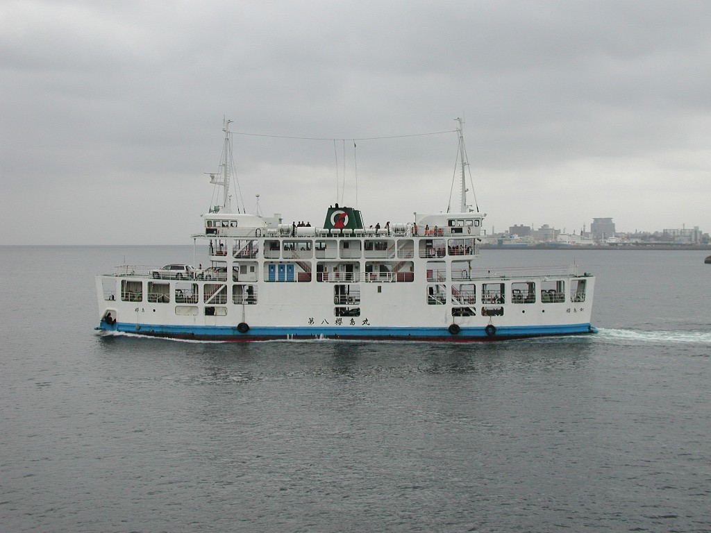 桜島フェリー第八櫻島丸 桜島町営の頃 IMO number: 7927063